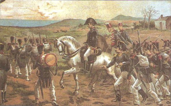 Pronunciamiento del comandante Rafael del Riego.